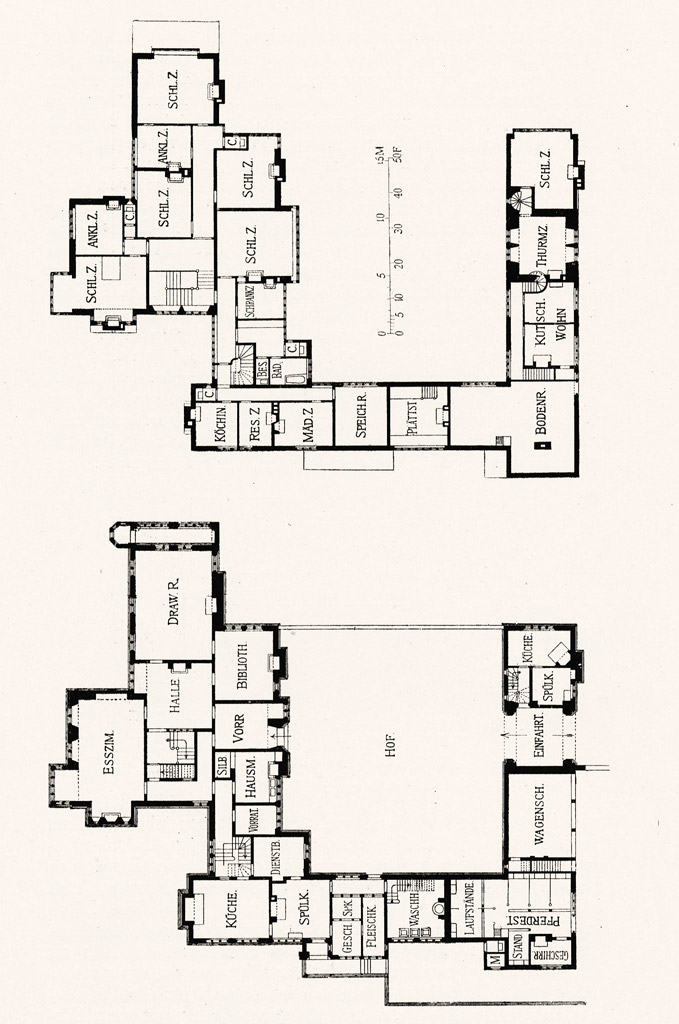 Abbildungen aus dem Buch Das englische Haus von Hermann Muthesius. Grundrisse von Erdgeschoss und erstem Stockwerk. Im Bildtitel bemerkt Muthesius: „Die Grundrisse stellen den - später veränderten - Zustand unmittelbar nach dem Bau dar.“ Der englische Architekt R. Norman Shaw war einer der Architekten, die Muthesius wirklich uneingeschränkt bewunderte.